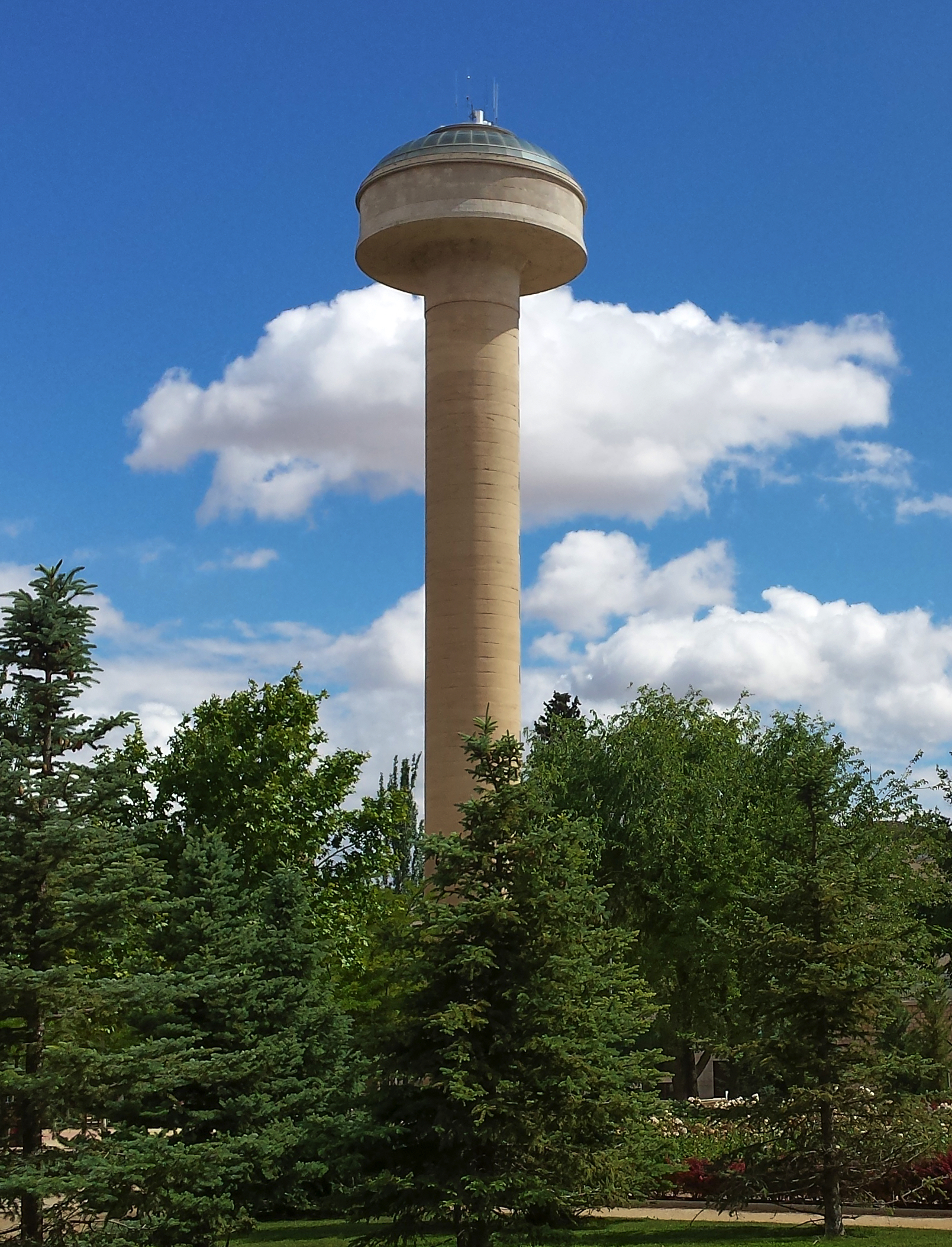 Depósito de Agua de la Fiesta del Árbol. Parque de la Fiesta del Árbol. Albacete